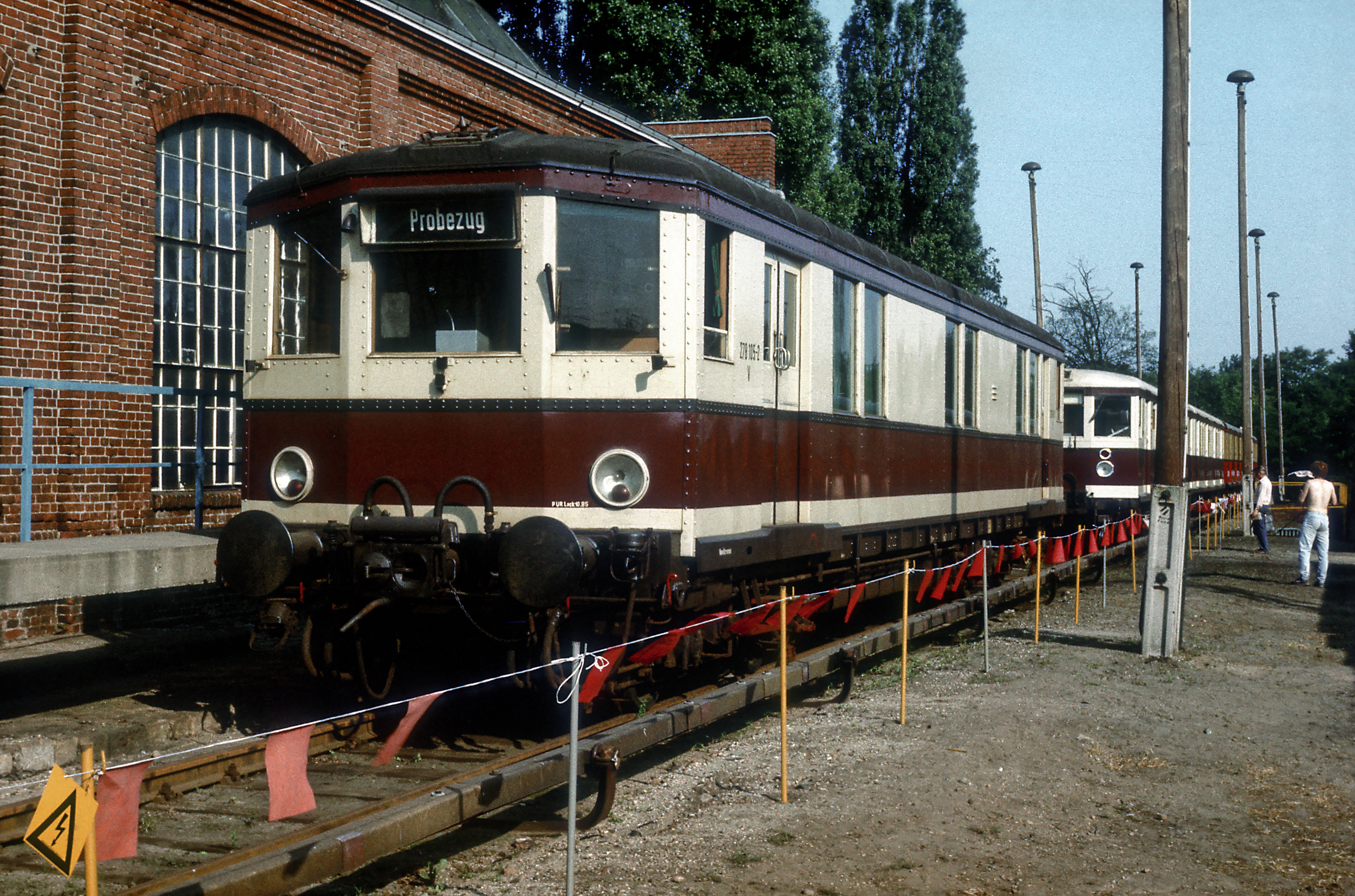 Schlepptriebwagen, 1963 aus dem ET 168 043 eines Gepäckzuges der Bauart »Oranienburg« entstanden, ursprünglich für den Verschub der im Raw Schöneweide gebauten zwei- und dreiachsigen Rekowagen. Fahrzeugausstellung 75 Jahre Bw Grünau